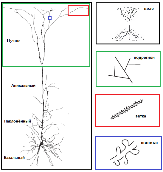 Дендритная организация пирамидального нейрона 5 слоя коры